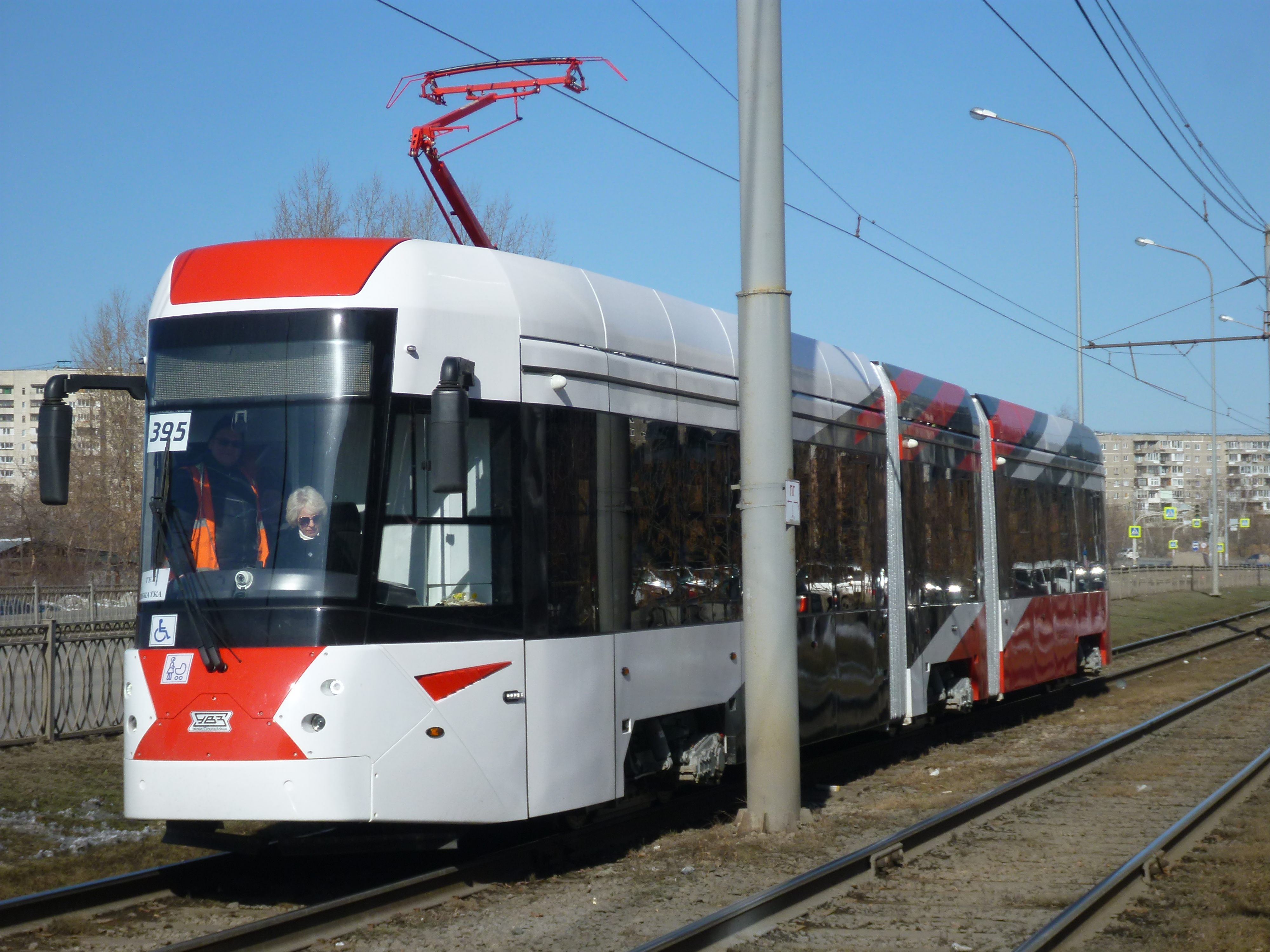 Новый трамвай 71-418 № 395 в Екатеринбурге на обкатке, 23 марта 2020 года